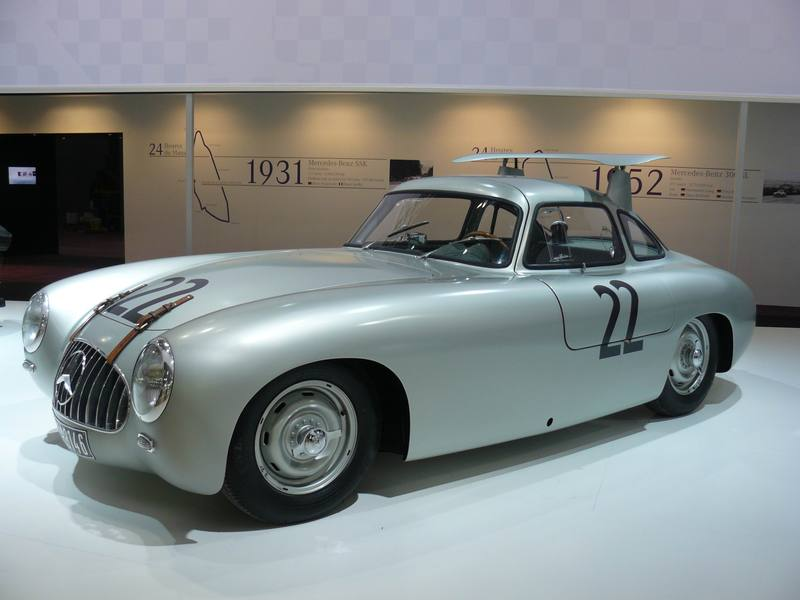 Français cadien: Retromobile 2012